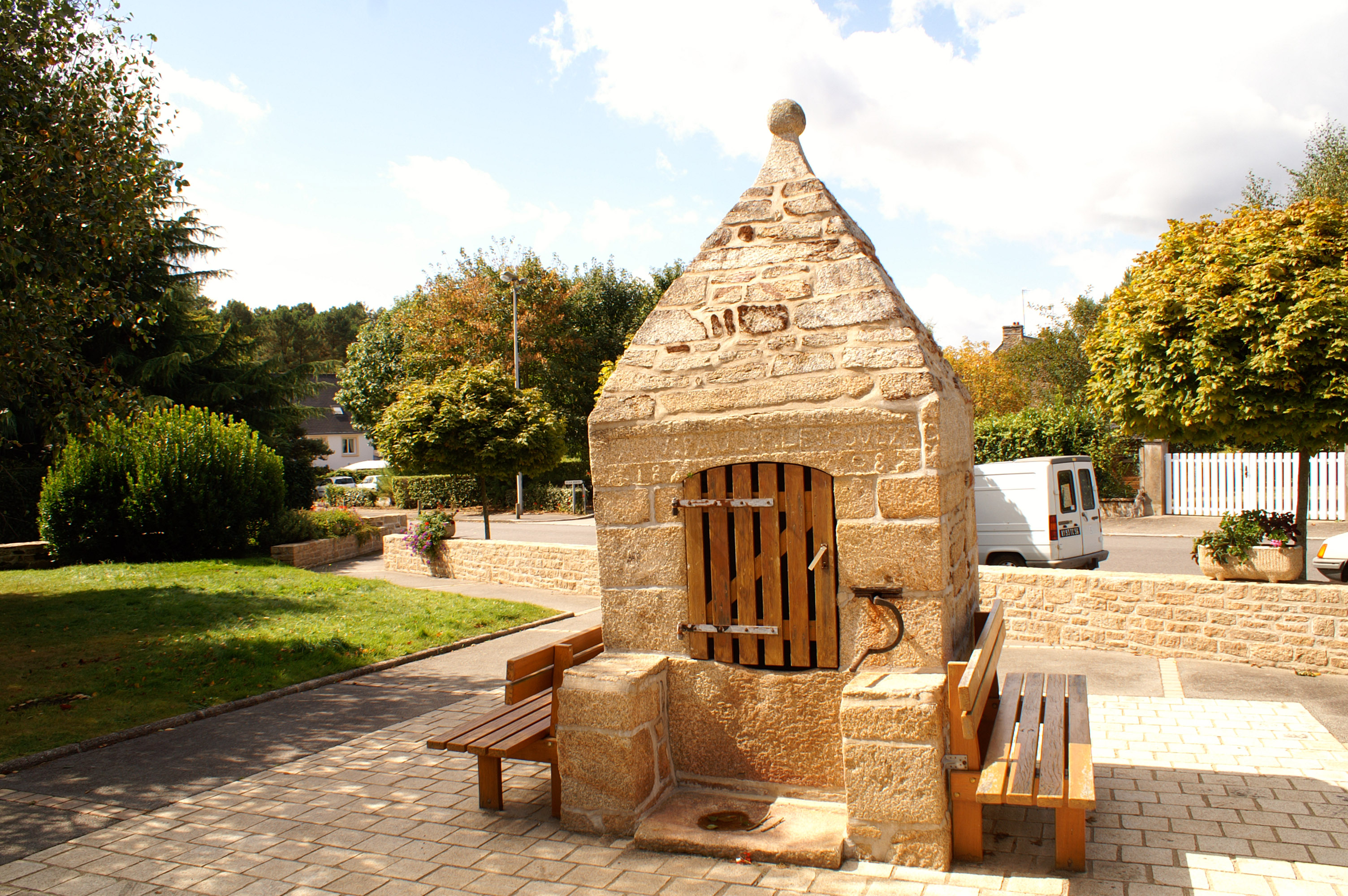 Puit fermé, près de la poste, au bourg de Marzan.